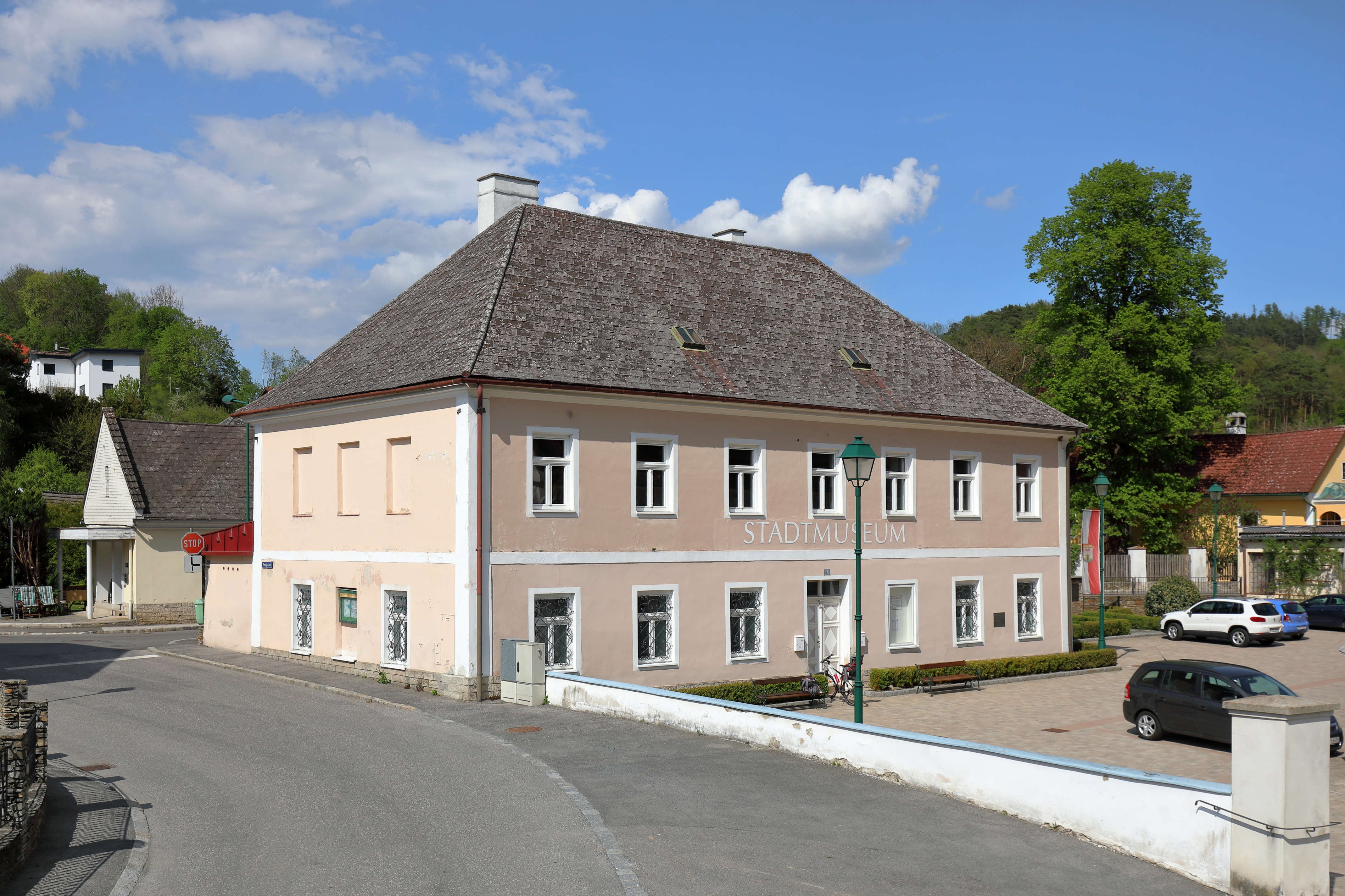 Südwestansicht des Heimat- bzw. Stadtmuseums in der niederösterreichischen Stadt Kirchschlag in der Buckligen Welt.Das Museum wurde auf Initiative des Juristen und Heimatkundlers Bruno Schimetschek (1908–2004) gegründet und 1984 im Hofhaus (heute Stadtamt) am Hauptplatz eröffnet. Seit 1995 befindet es sich am Kirchplatz Nr.1. Dieser Bau wurde Ende 18. / Anfang 19. Jahrhunderts errichtet und 1875 erweitert. In ihm war die Pfarr- bzw. die Volksschule untergebracht und später die Sparkasse sowie das Gemeindeamt. Im Zuge der Stadterhebung erfolgte 2002 die Umbenennung von Heimatmuseum in Stadtmuseum.